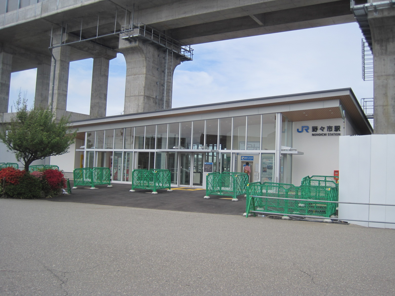 野々市駅（石川県野々市市、2012年）